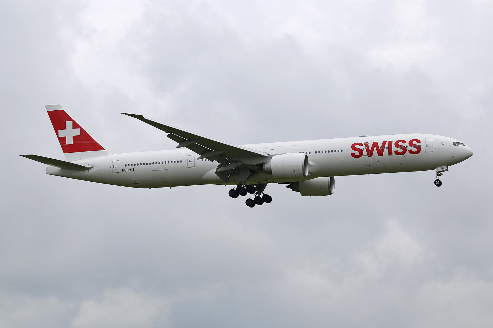 Zürich (- Kloten) (ZRH / LSZH) Switzerland 6.2016